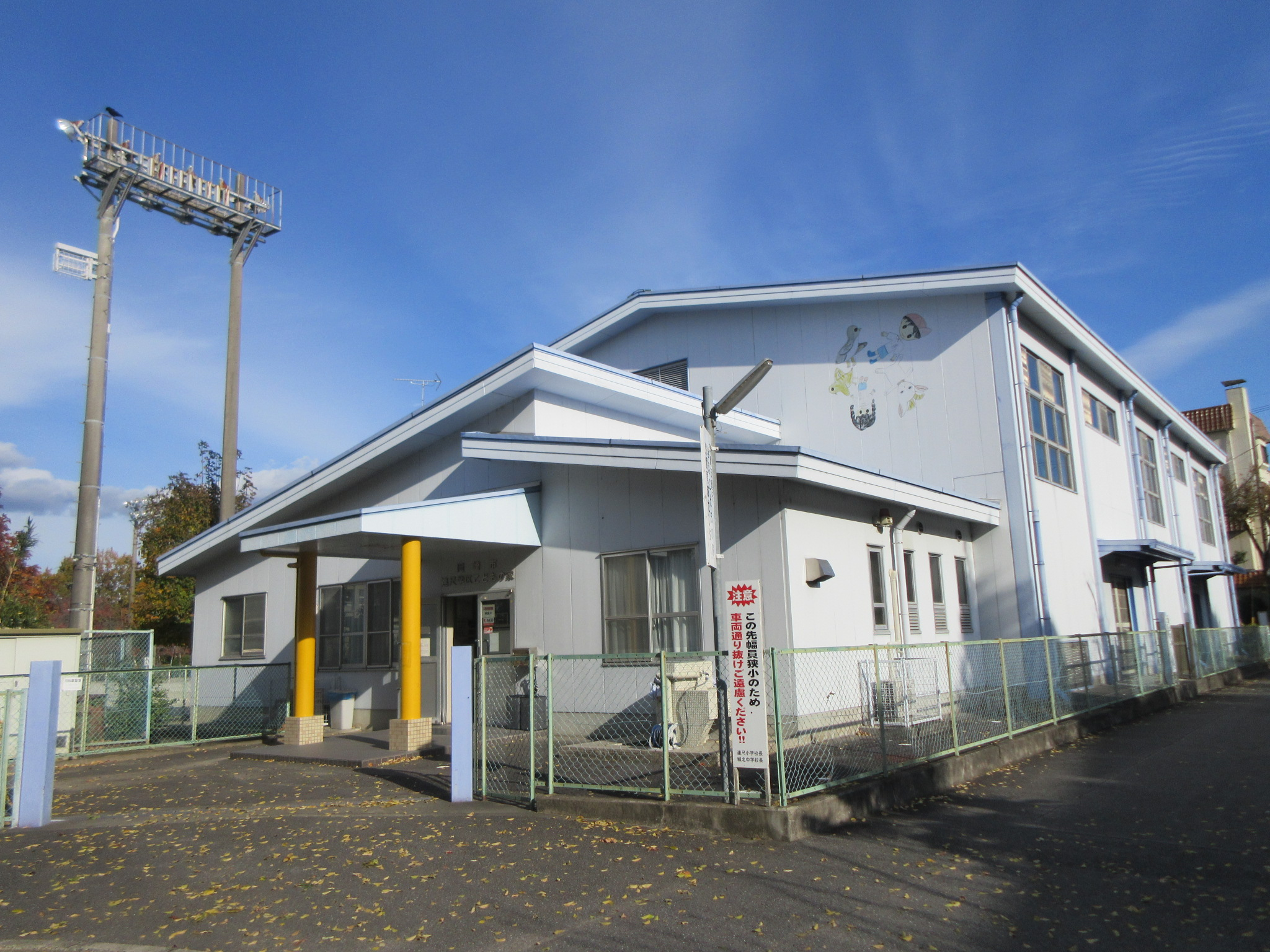 岡崎市連尺学区こどもの家（岡崎市城北町）